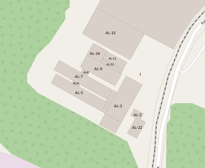 Plan de l'ancienne Aluminerie de Shawinigan avec le numéro de chacun des bâtiments existant.